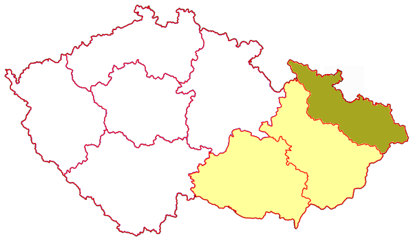 Mappa della diocesi cattolica di Ostrava-Opava, nella Repubblica Ceca. Lavoro personale.